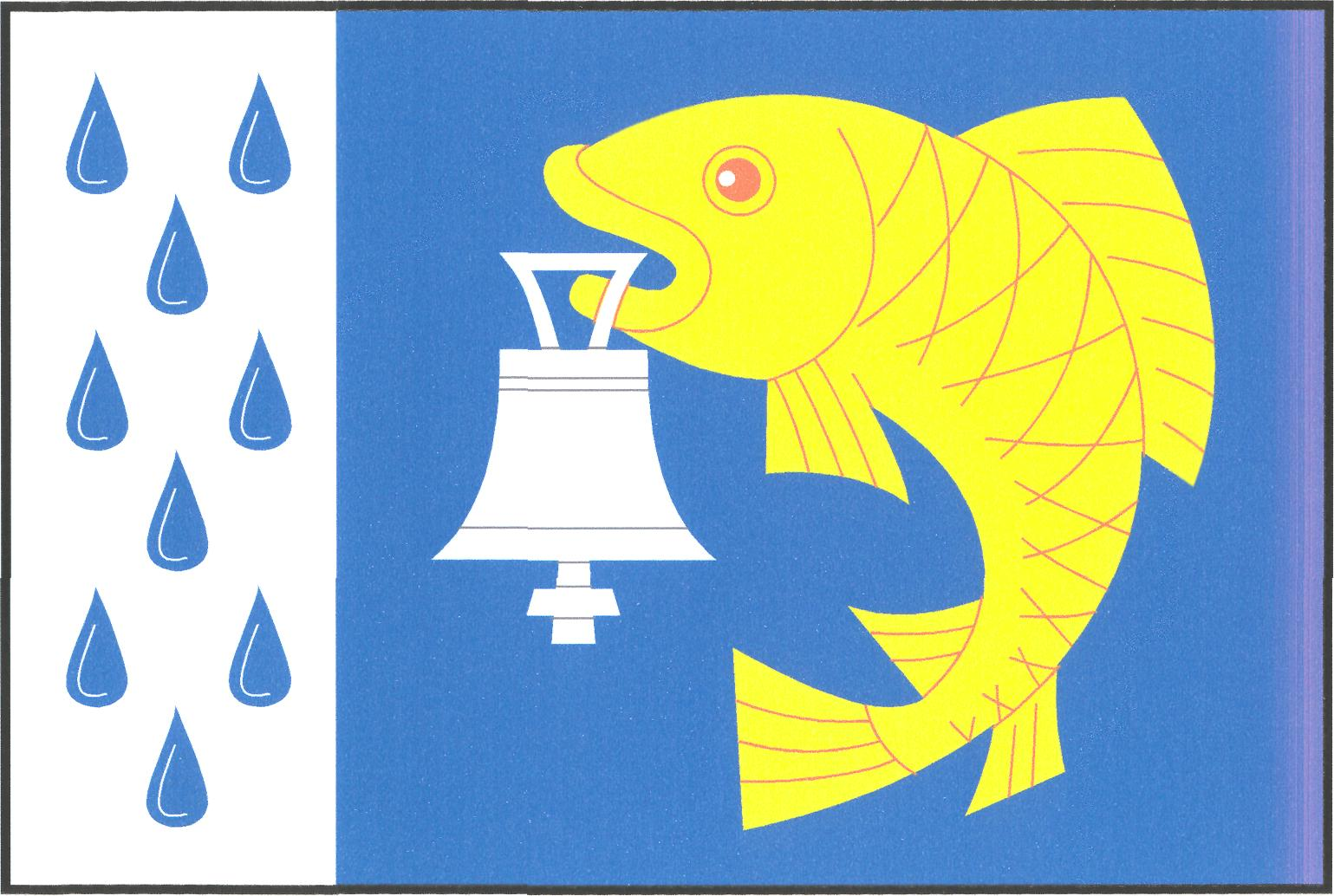 Vlajka obce Mokrouše